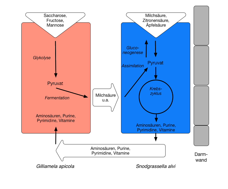 Interaktionen im Stoffwechsel zwischen Snodgrassella alvi und Gilliamella apicola im Bienendarm, vereinfachte Darstellung nach Waldan K. Kwong, Philipp Engel, Hauke Koch, Nancy A. Moran: Genomics and host specialization of honey bee and bumble bee gut symbionts. Proceedings of the National Academy of Sciences 111 (31), 5. August 2014; S. 11509-11514.